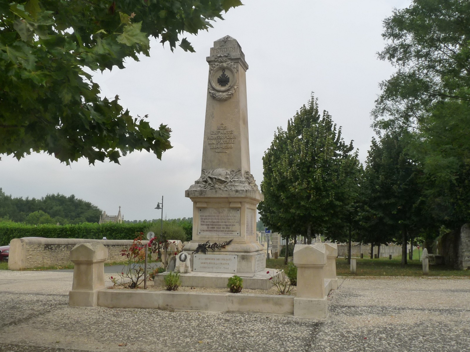 Monument aux morts, Cartelègue,Gironde, France